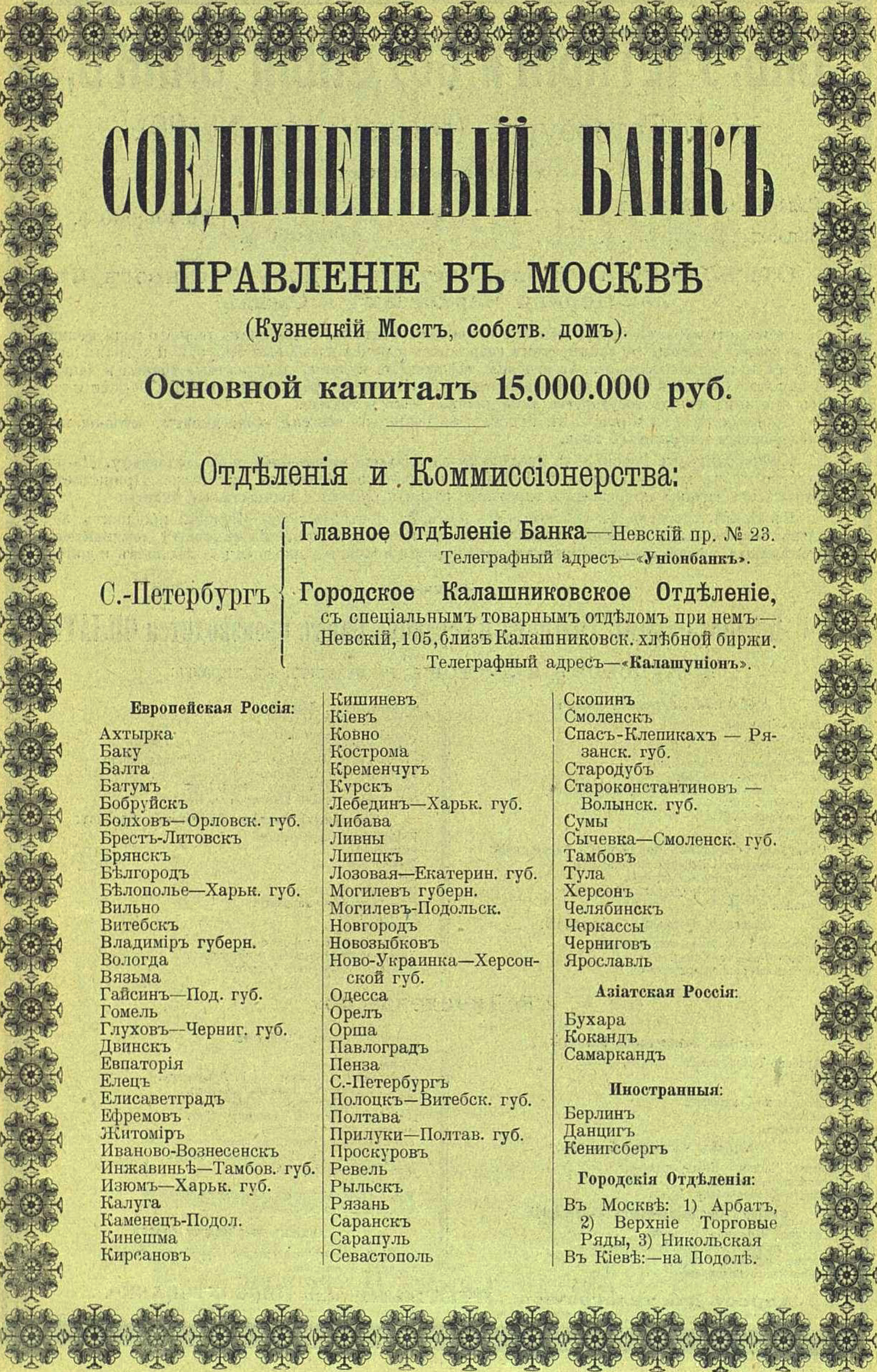 Реклама Соединенного банка, 1911 год.